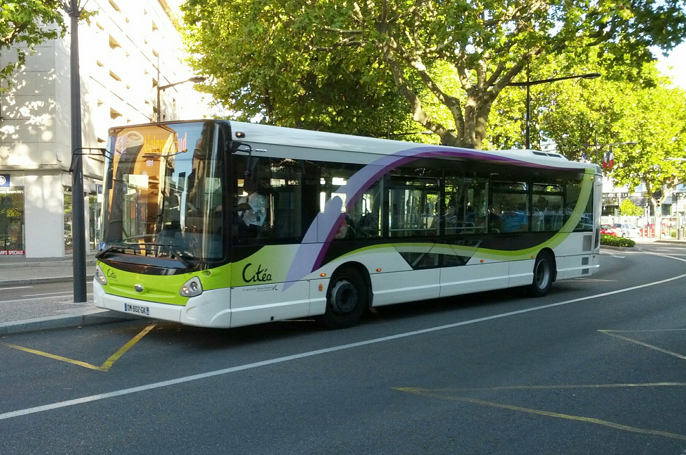 Un bus de la Citéa à l'arrêt Turin dans le centre de Valence.